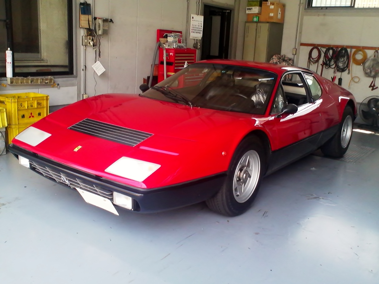 フェラーリ・365GT/4 BBをフロントから撮影。